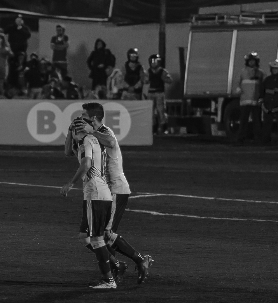 1 Fernando Muslera 22 Martín Cáceres 2 José María Giménez 3 Diego Godín C 13 Gastón Silva 4 Federico Valverde 15 Matías Vecino Falero 6 Rodrigo Bentancur 10 Giorgian De Arrascaeta 9 Luis Suárez 21 Edinson Cavani DT Óscar Tabárez Suplentes: 12 Martín Campaña 23 Esteban Conde 19 Sebastián Coates 16 Maxi Pereira 17 Egidio Arévalo Ríos 20 Alvaro González 5 Carlos Sánchez 7 Cristian Rodríguez 14 Nicolás Lodeiro 8 Jonathan Urretaviscaya 11 Christian Stuani 18 Maximiliano Gómez Camera: Canon EOS 5D Mark II 0 ISO: 1000